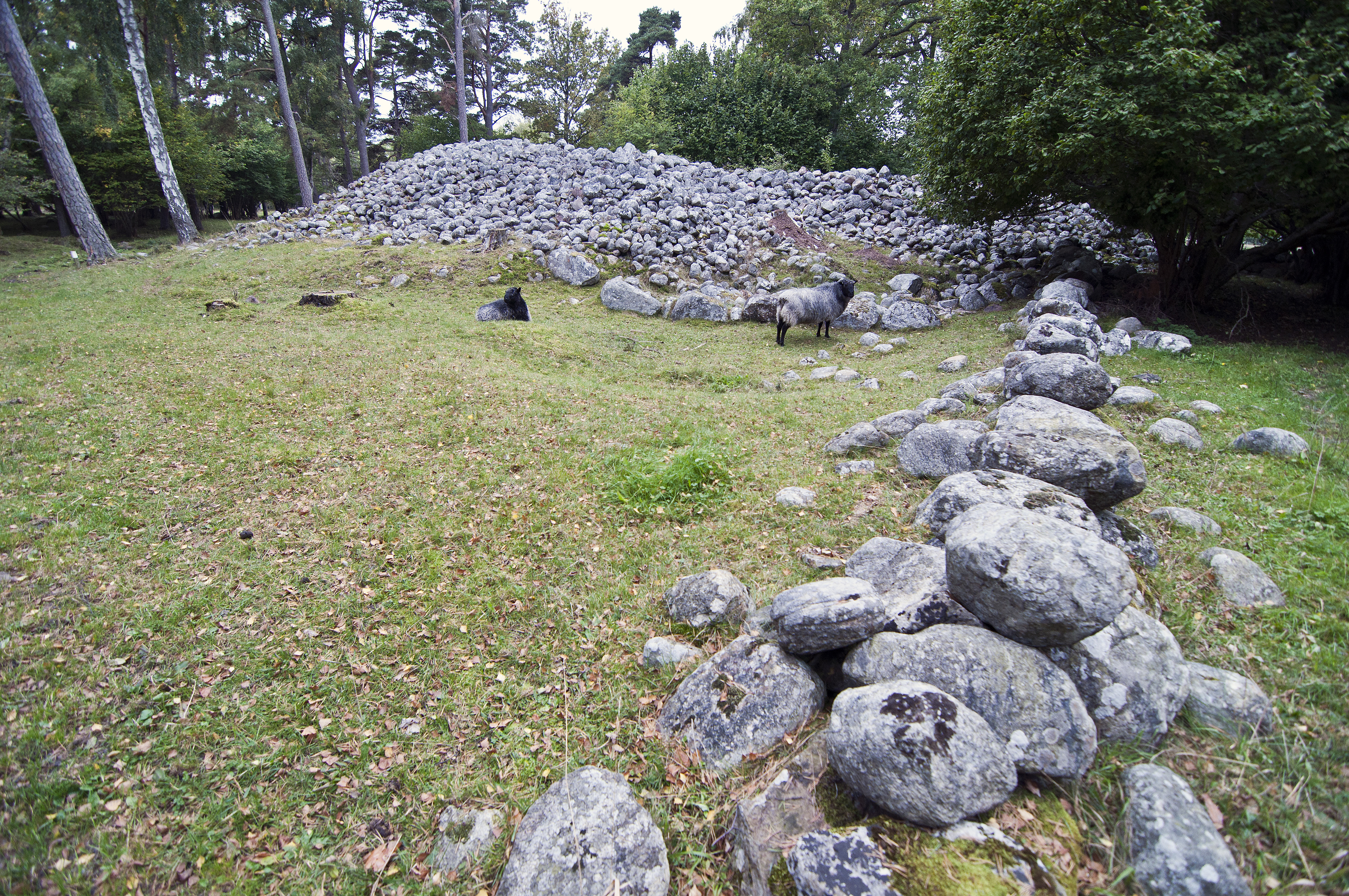 40x4 m stort röse med en stensträng i förgrunden.